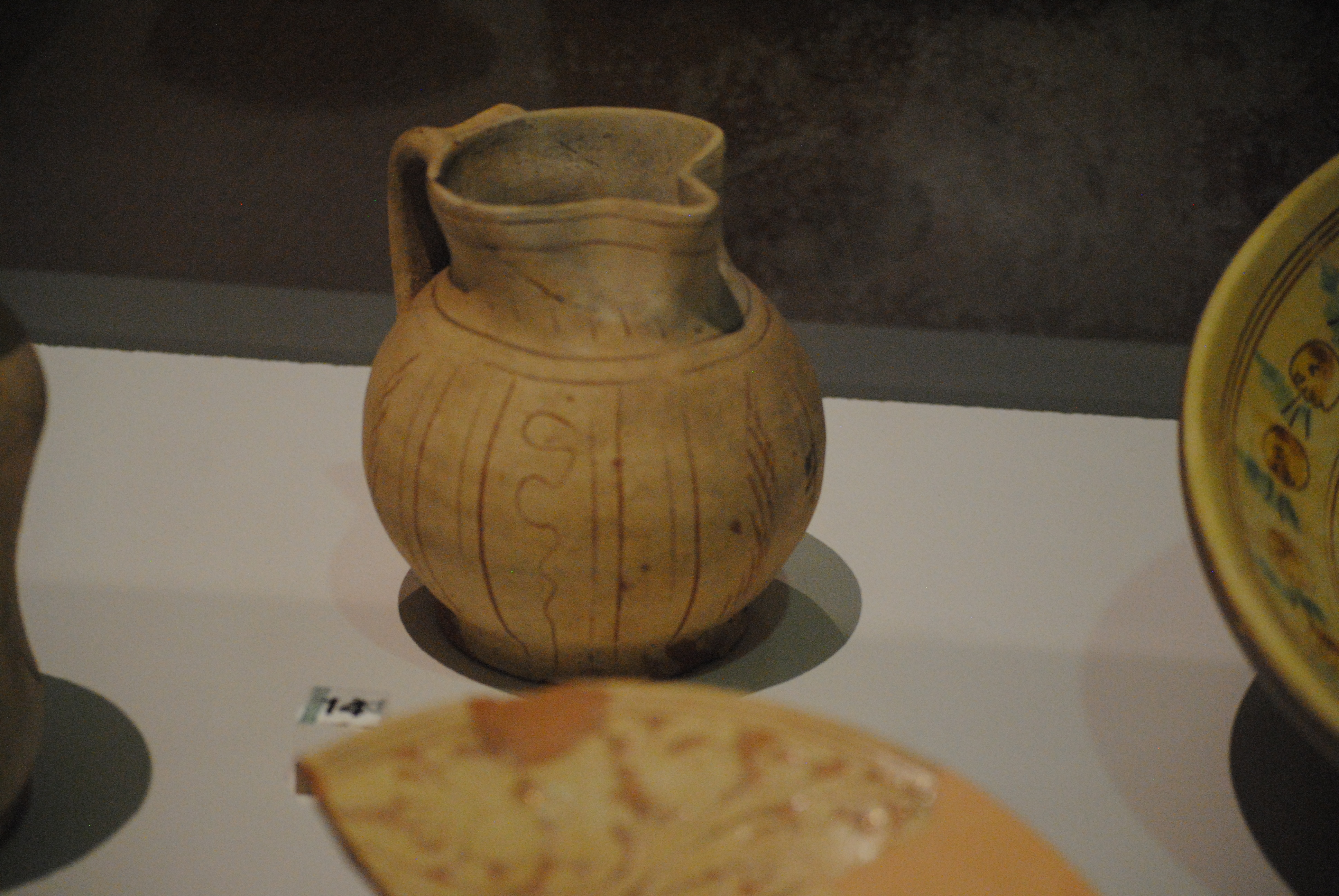 Boccale ingobbiato monocromo (scarto di prima cottura), risalente al XVII secolo (recuperato durante lo scavo in via Sapienza, Pisa, manifattura Bitozzi) - Museo nazionale di San Matteo.